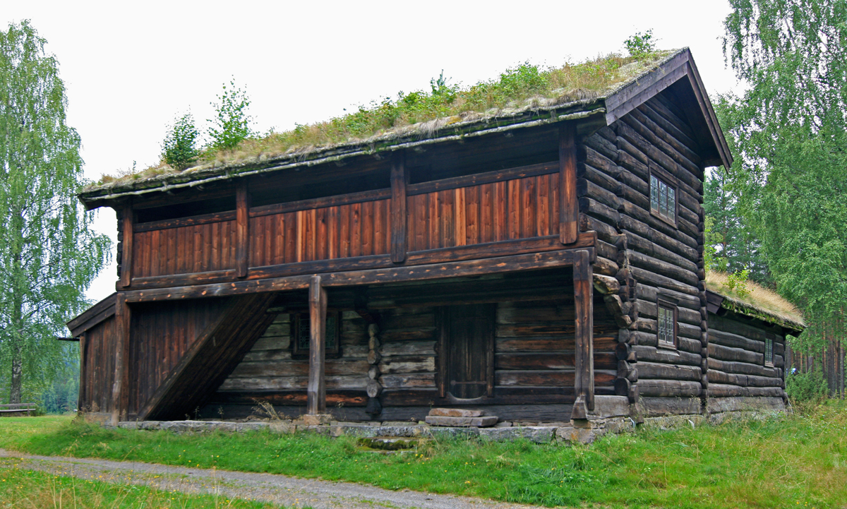 Ramloftstue fra Stemsrud i Grue, bygd 1630. I dag på Glomdalsmuseet.